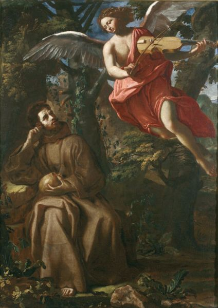 San Francesco consolato dall'angelo, Galleria Nazionale di Palazzo Arnone, Cosenza, Italia